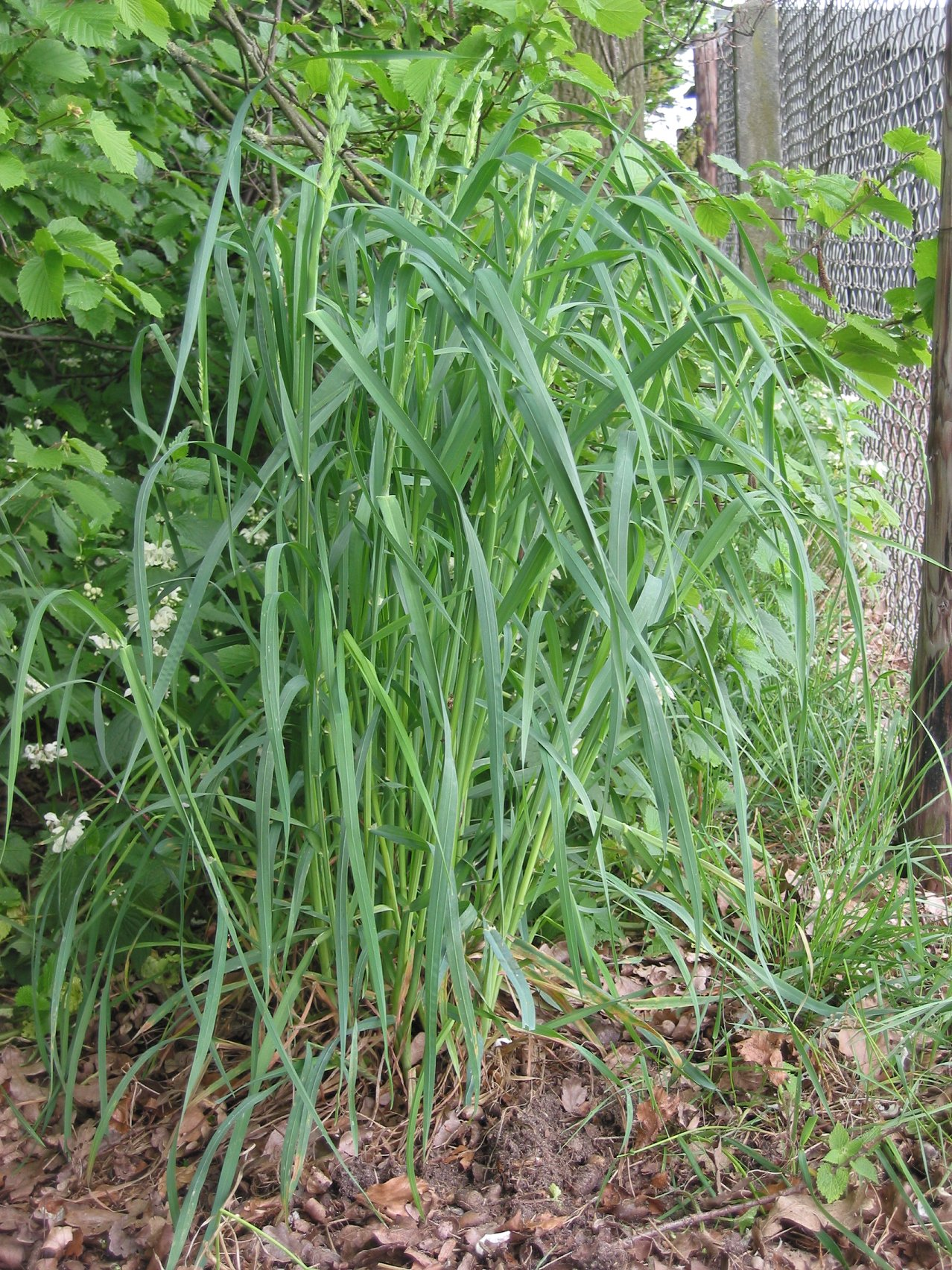 Dactylis glomerata Kropaar doorschietend